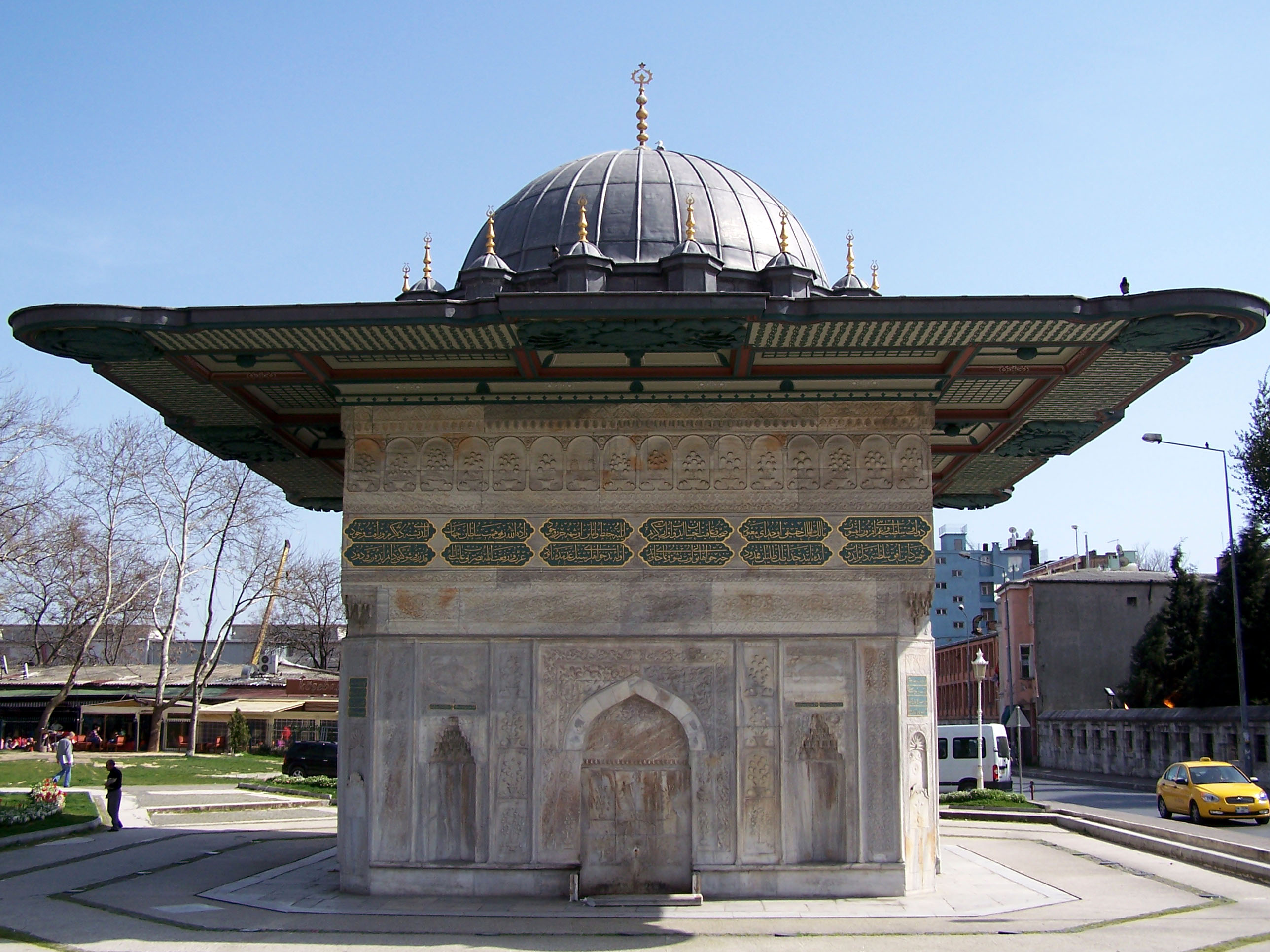 Tophane Çeşmesi near Kılıç Ali Paşa Camii in Tophane-Beyoğlu.